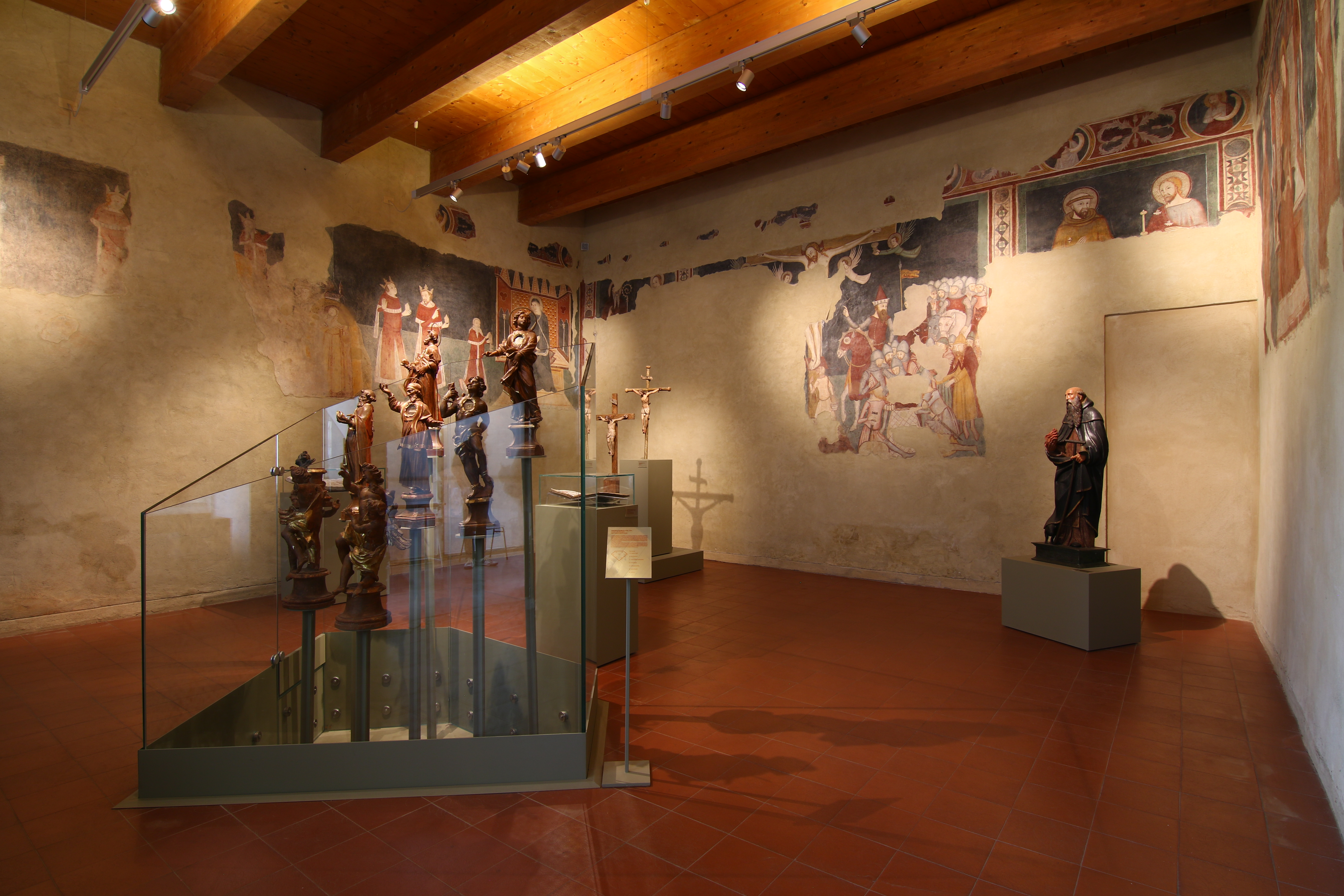 Museo San Francesco Cassine This is a photo of a monument which is part of cultural heritage of Italy.